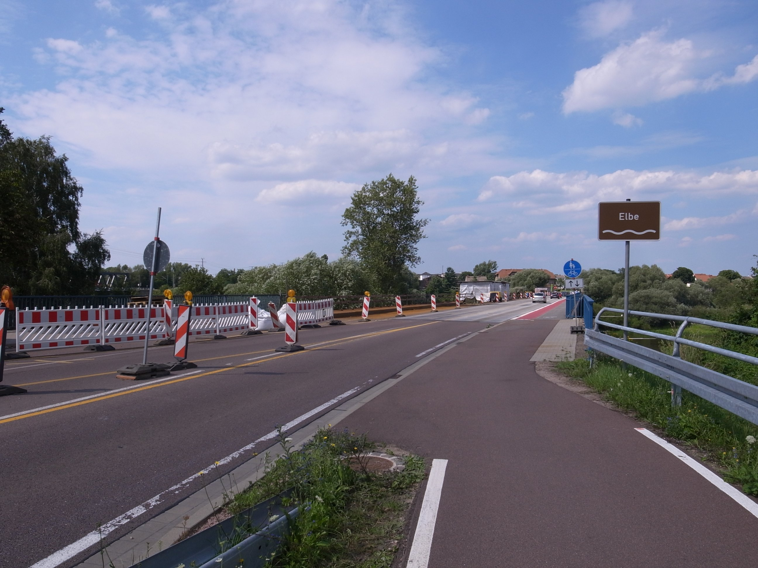 Elbebrücke Roßlau (Straße),Sanierungsarbeiten 2010/11